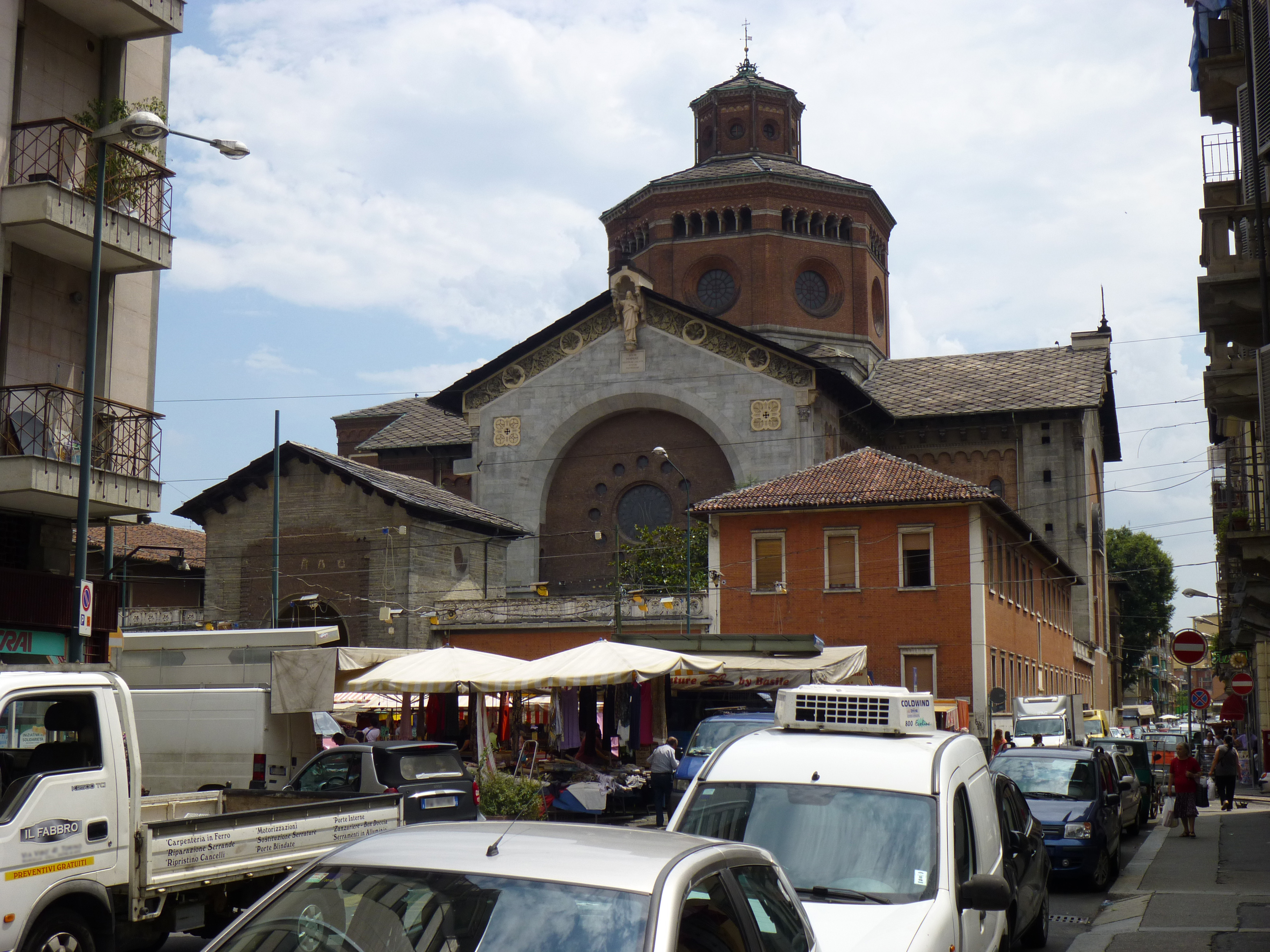 Torino, Borgo Vittoria, Chiesa della Madonna della Salute (costruzione eclettica in stile neo-romanico iniziata nel 1895). Scorcio da via Vibò verso piazza della Vittoria, sede di un popolare mercato rionale.